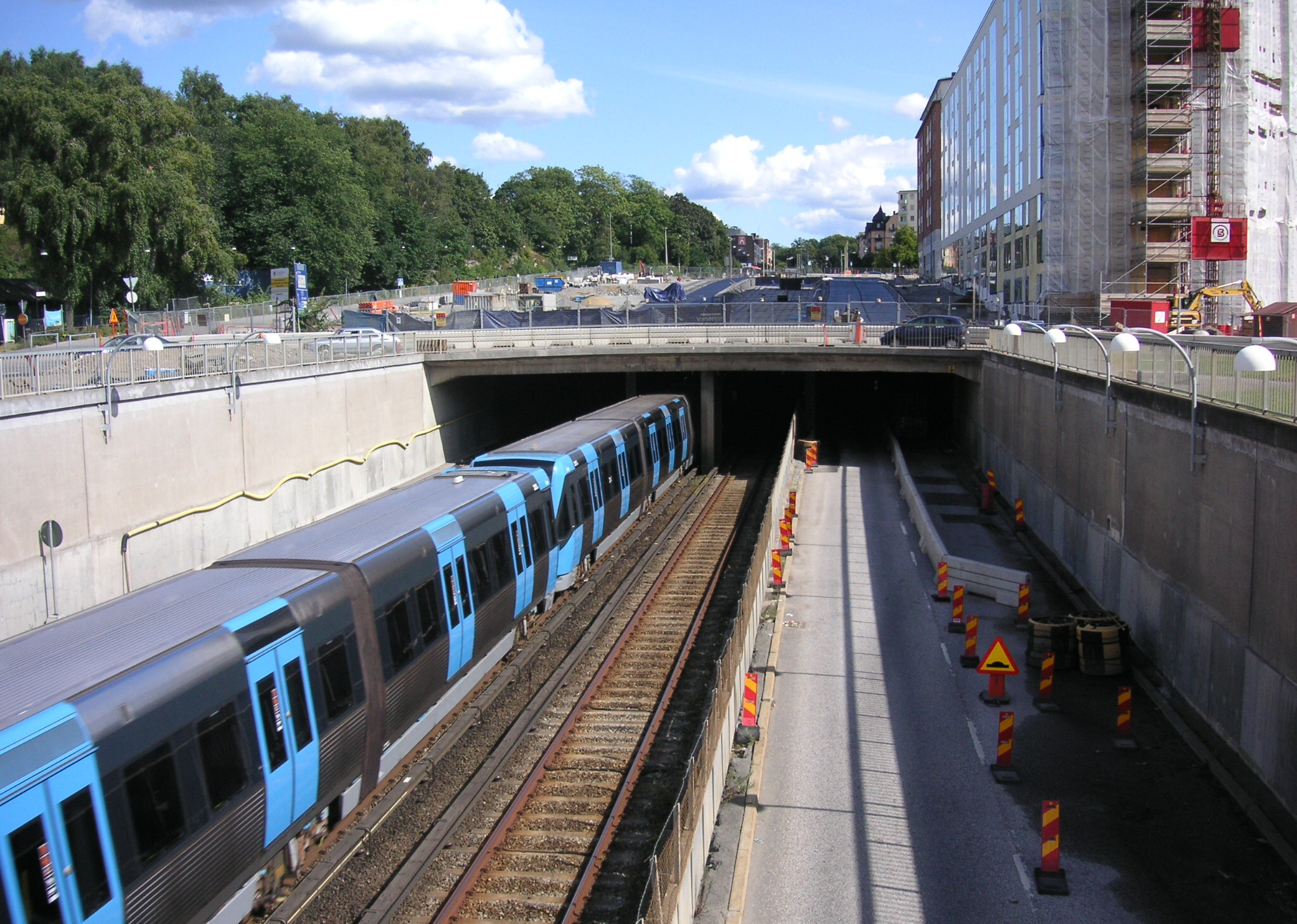 Drottningholmsvägen i Stockholm, ombyggnad vid Lindhagensplan, nytt tunnelavsnitt